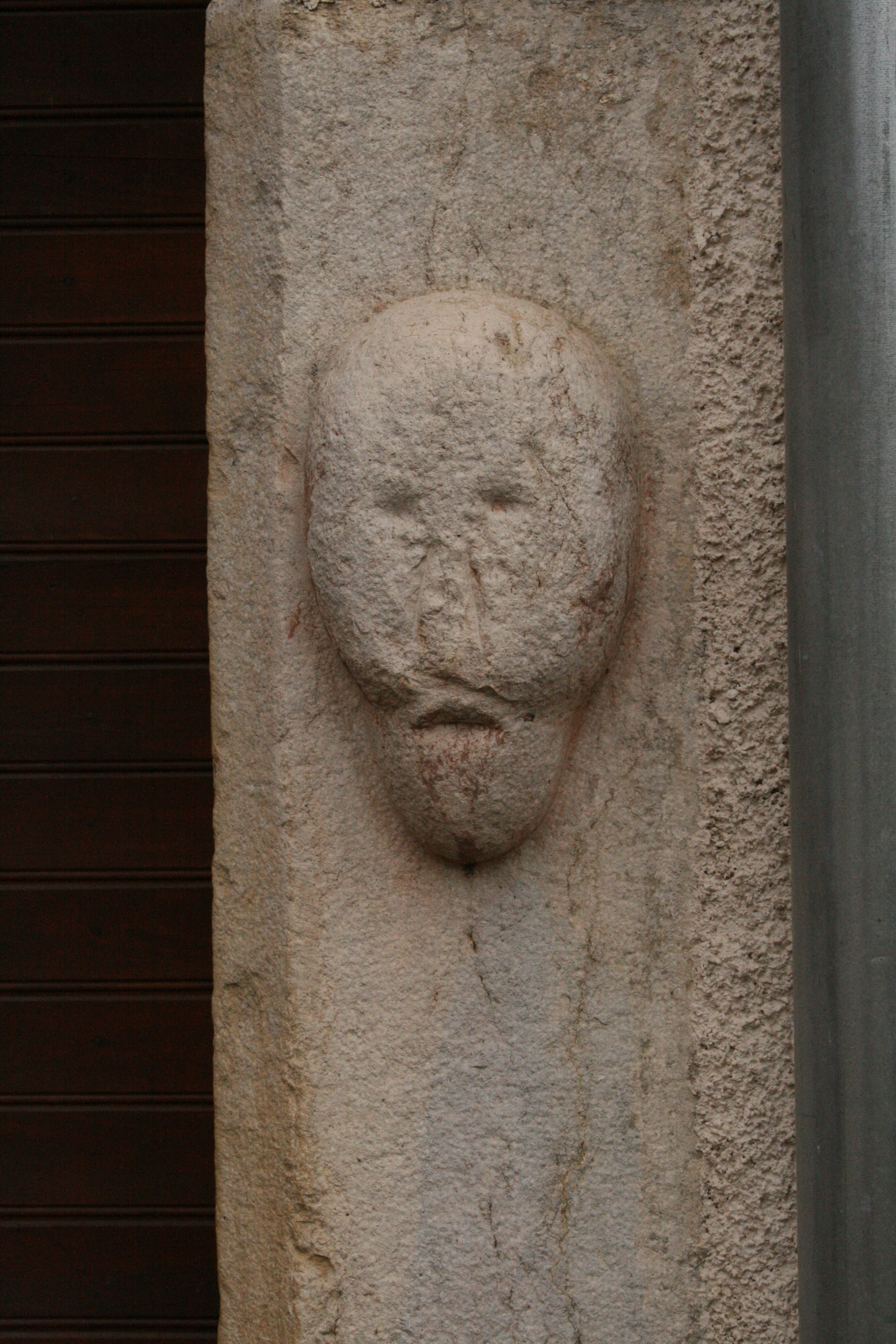 Cerre-lès-Noroy Linteau époque carolingienne